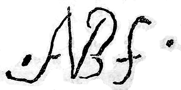 Monogram Abraham van Beijeren